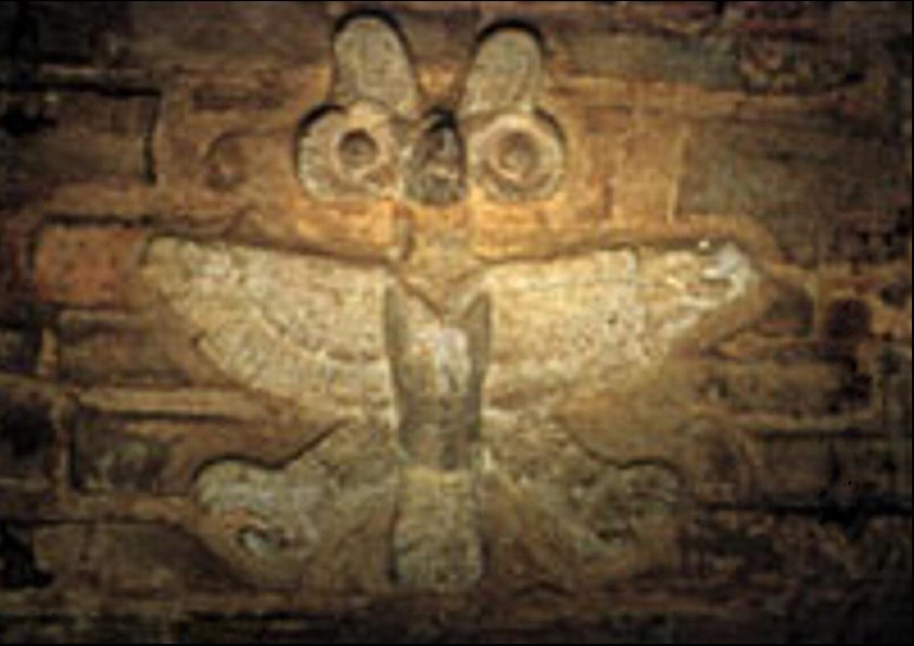 este buho grabado en alto relieve en una de las paredes de la tumba 1 de Zaachila, es uno de los iconos mas reconocidos de Zaachila, oaxaca. las tumbas en las que se pueden apreciar este tipo de relieves se encuentran en el centro de esta población y su origen es mixteco, datan del siglo XIIIdC.